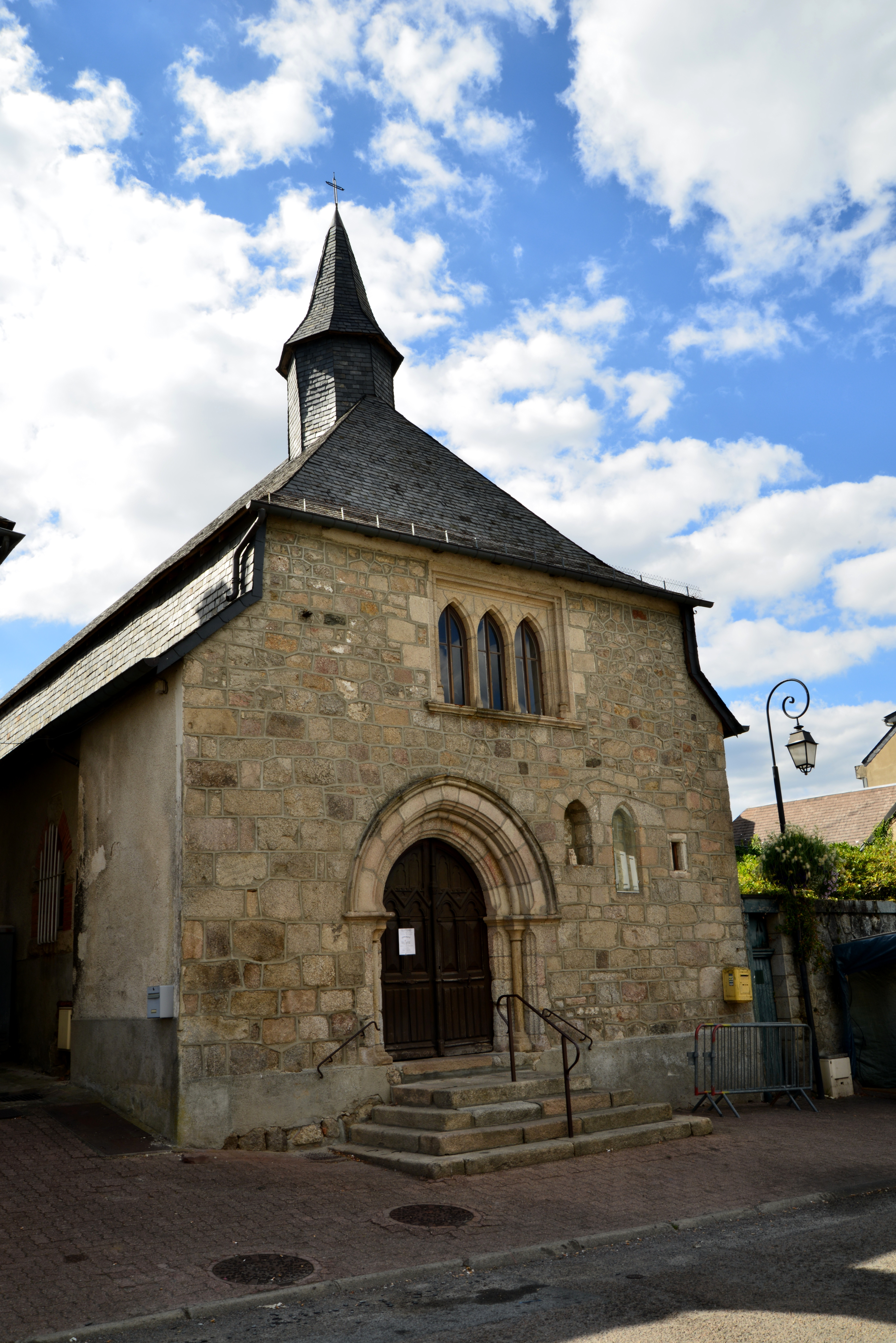 chapelle de l'hôpital